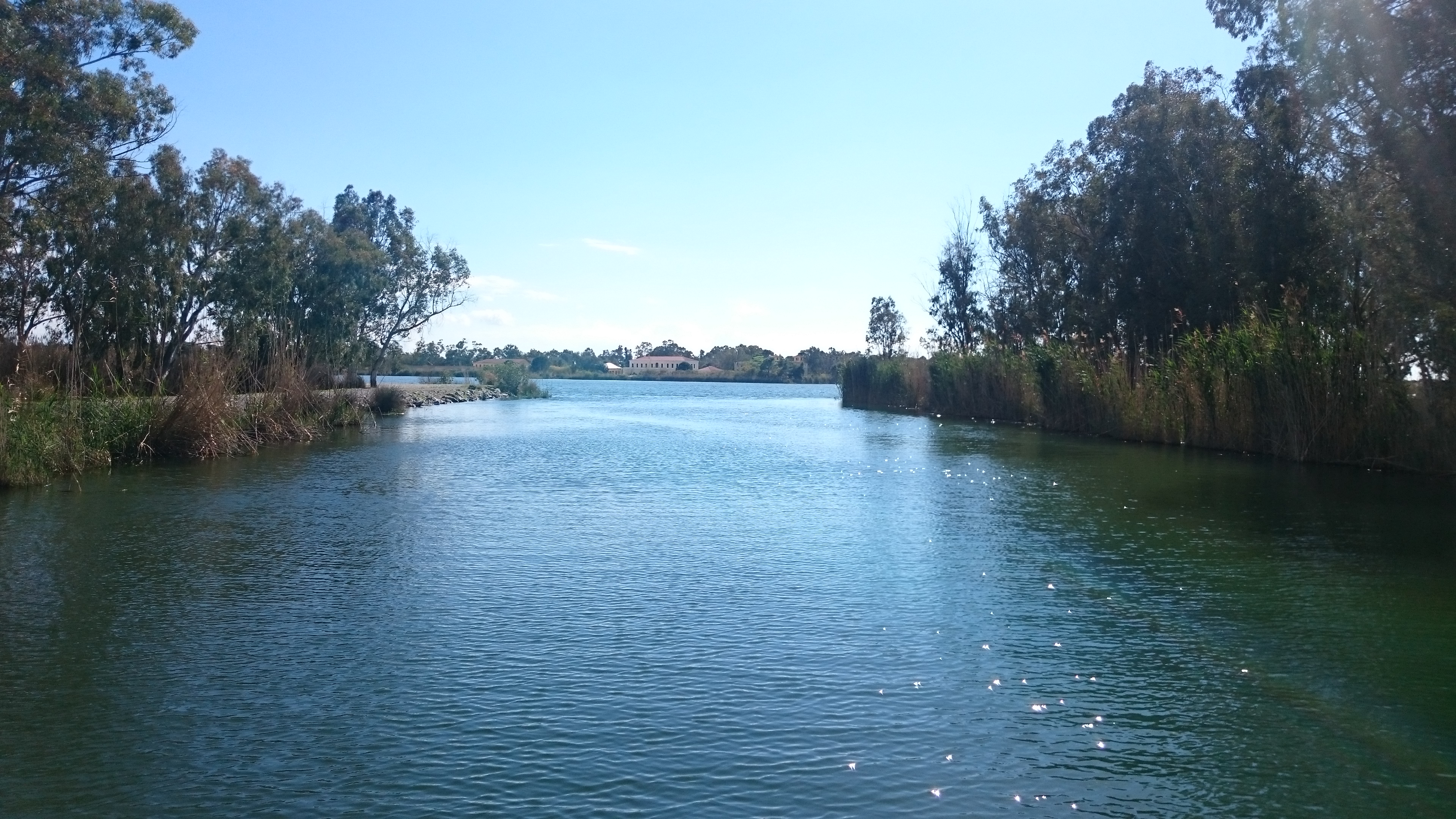 Λίμνη Καϊάφα This is a photography of Natura 2000 protected area with ID GR2330005